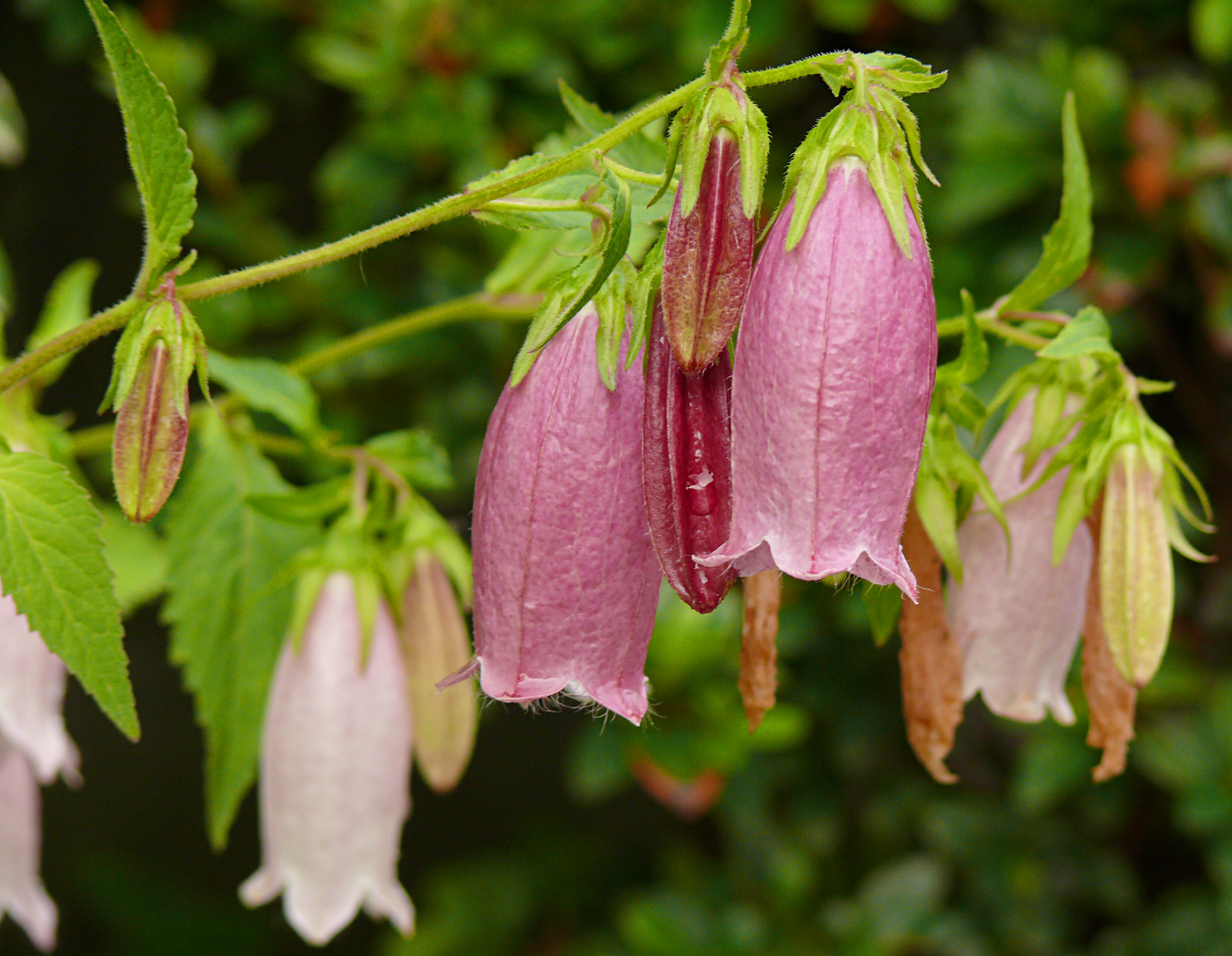 Campanulae punctatae(ホタルブクロ)